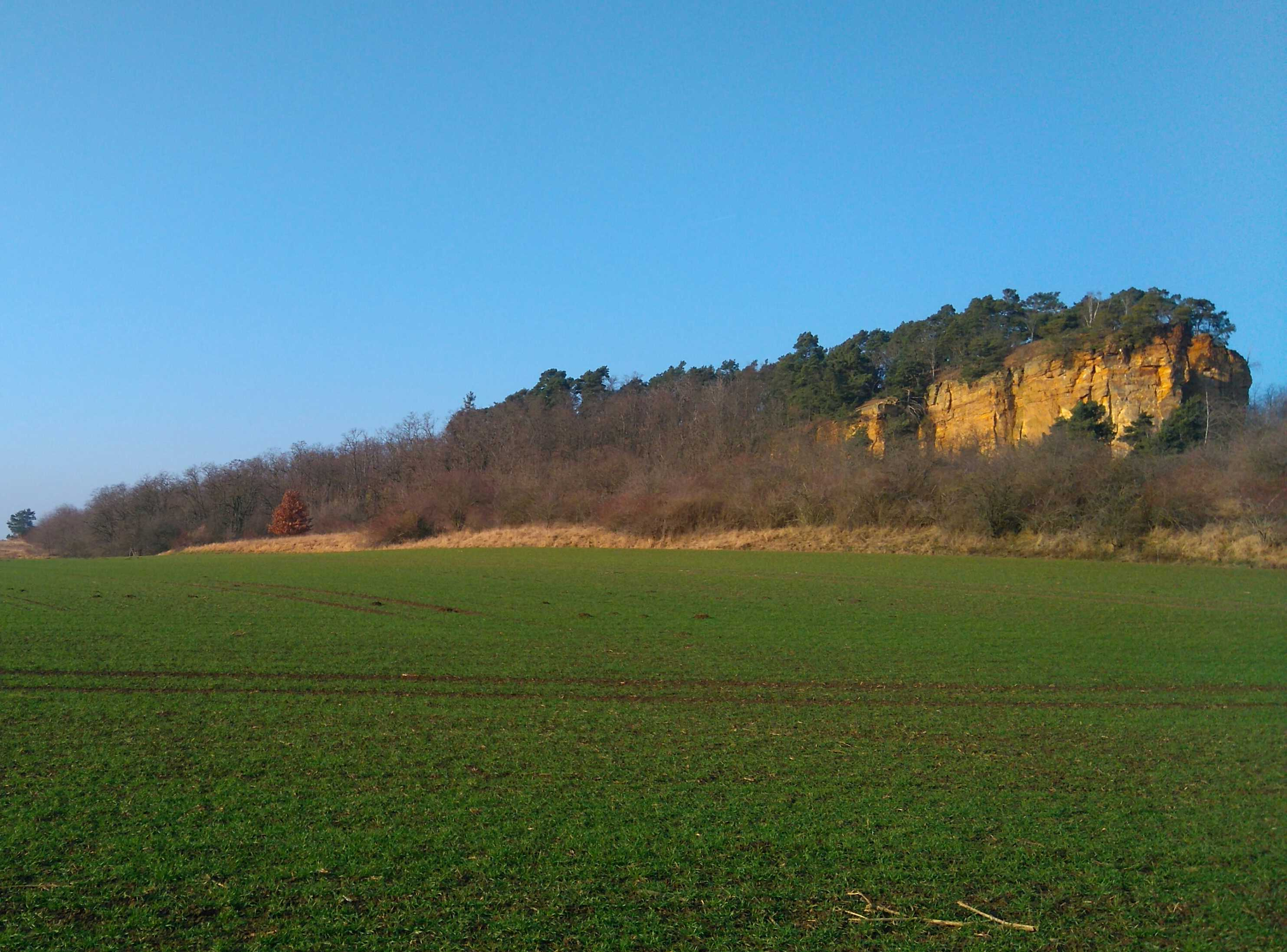 Blick zum Lehof bei Quedlinburg von Südöst